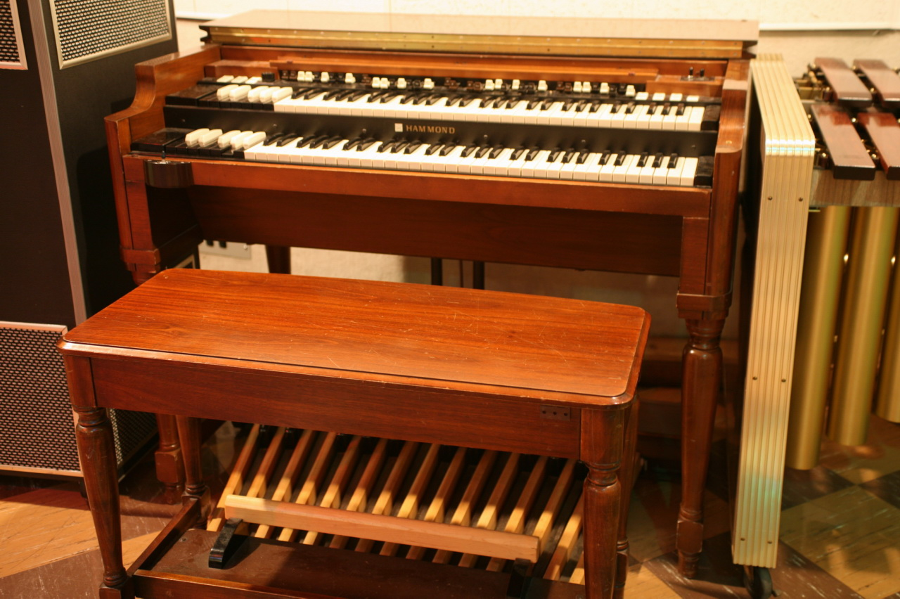 Hammond Organ